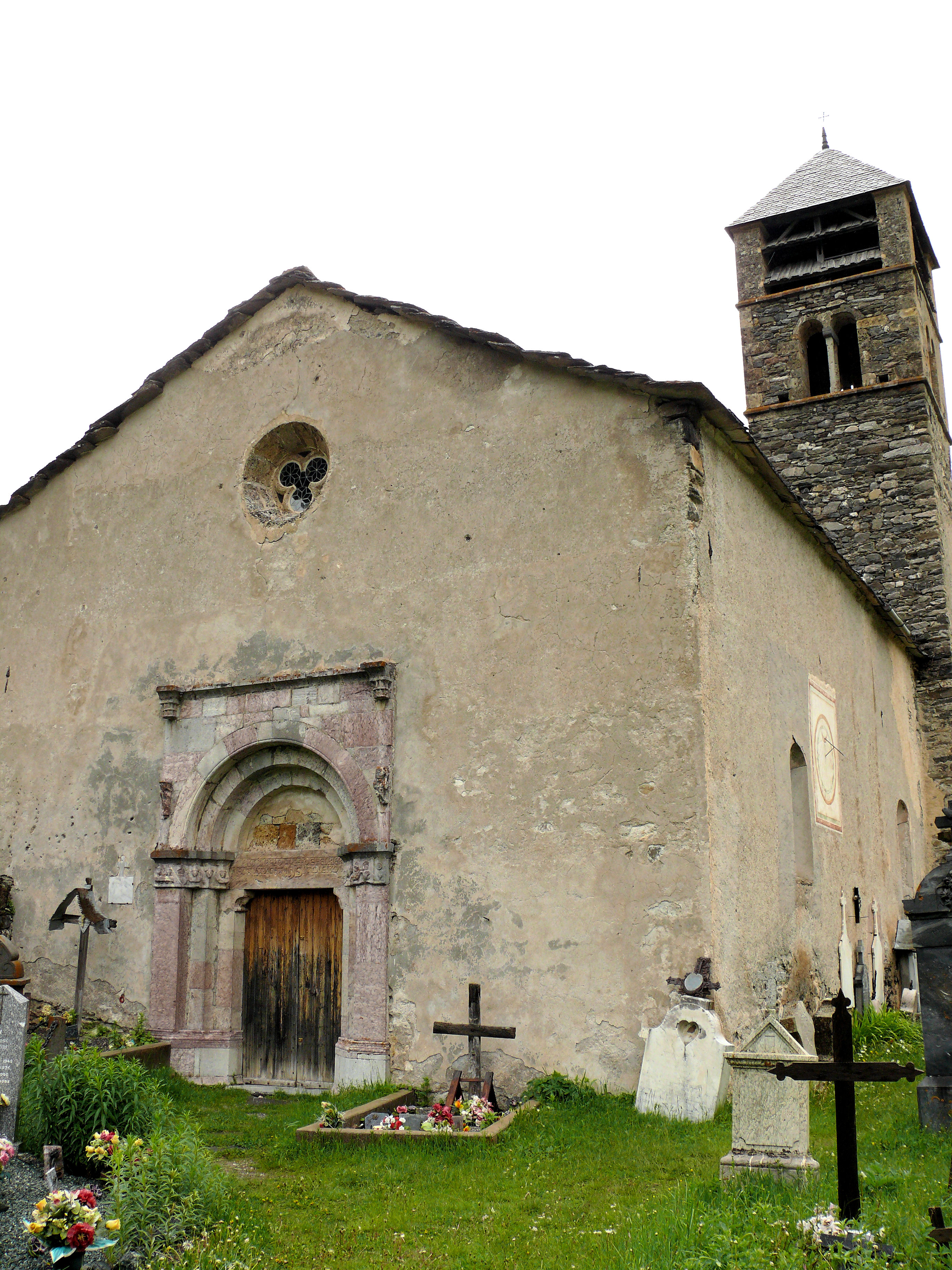 Saint-Paul-sur-Ubaye - Eglise Saint-Antoine-du-Désert à Maurin et son cimetière